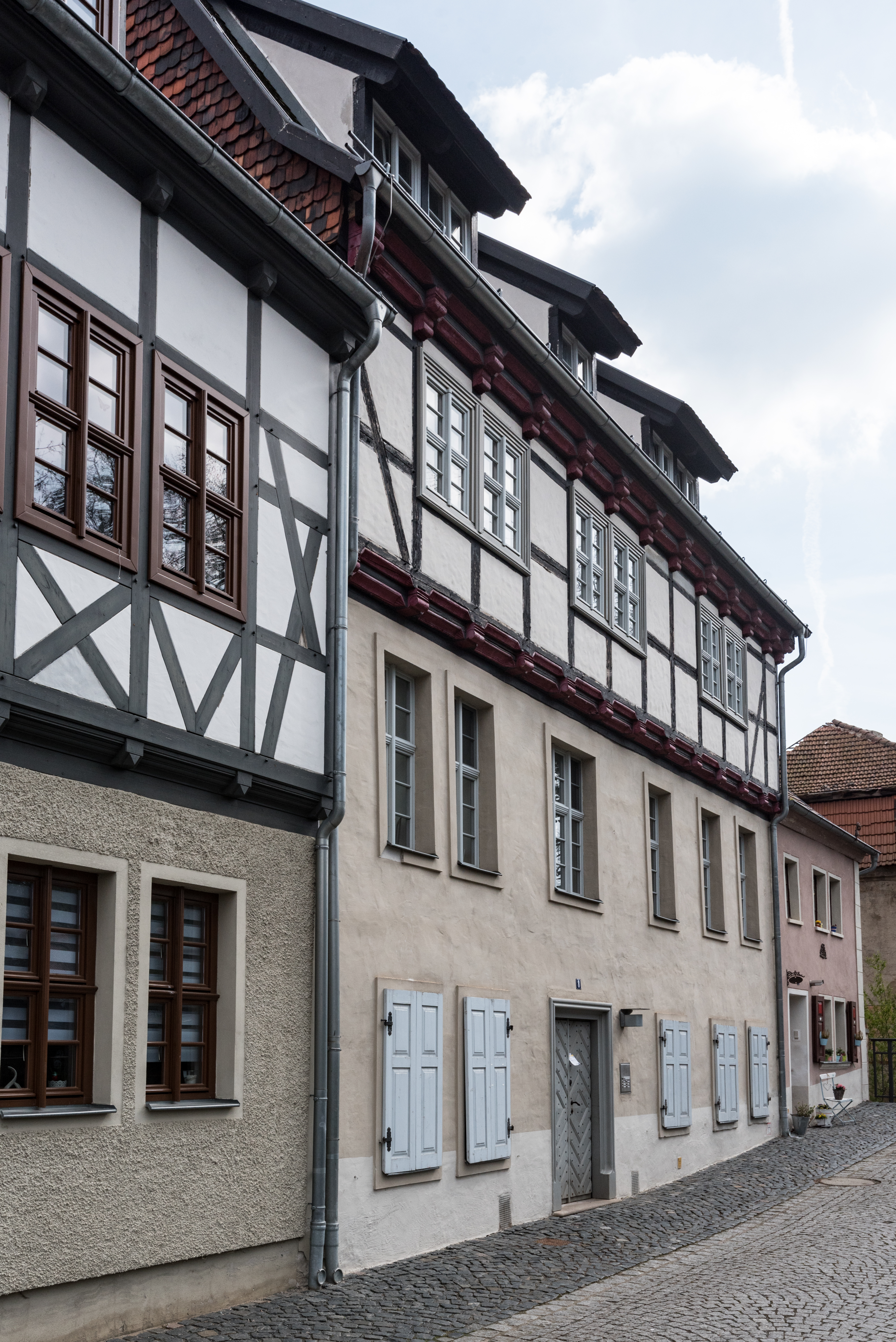 Aschersleben, Schuhstieg 8